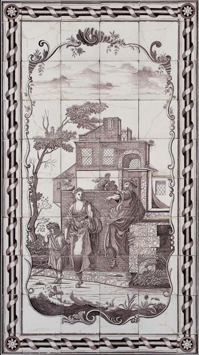 Paars tegeltableau in metalen lijst, man (Abraham), vrouw (Hagar) en kind (Ismaël) voor een huis, de verstoting van Hagar. Rotterdam